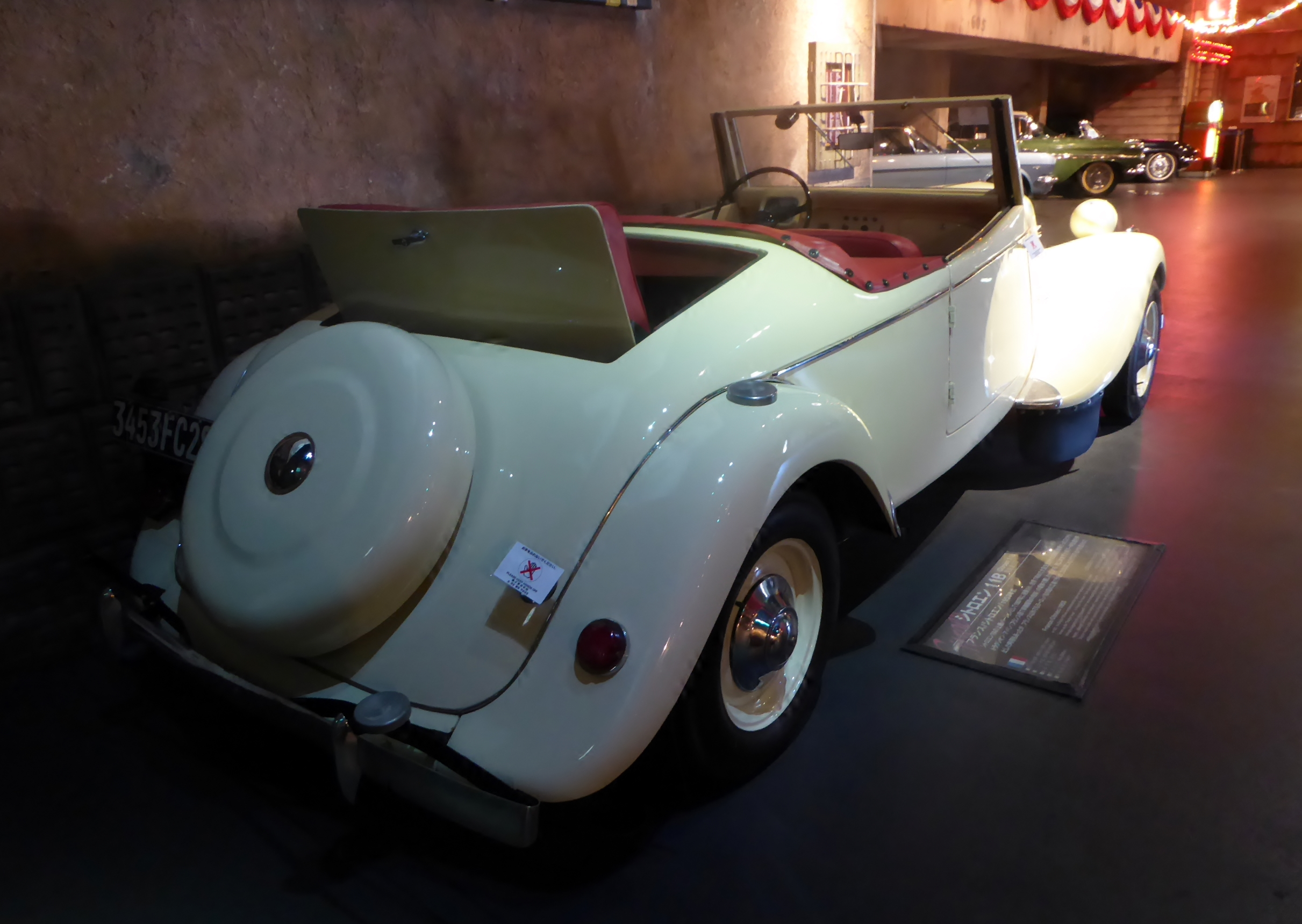 1953年シトロエン・11Bをリアから撮影。